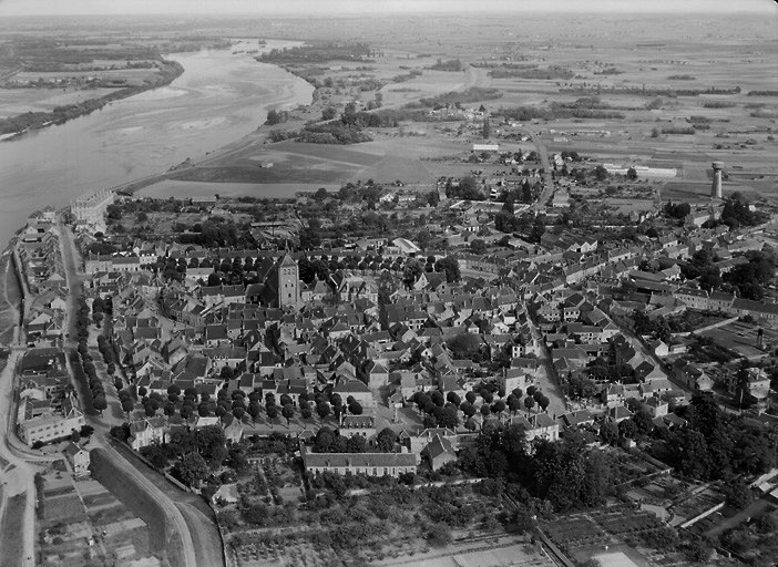 Vue aérienne, Jargeau, Noir et Blanc